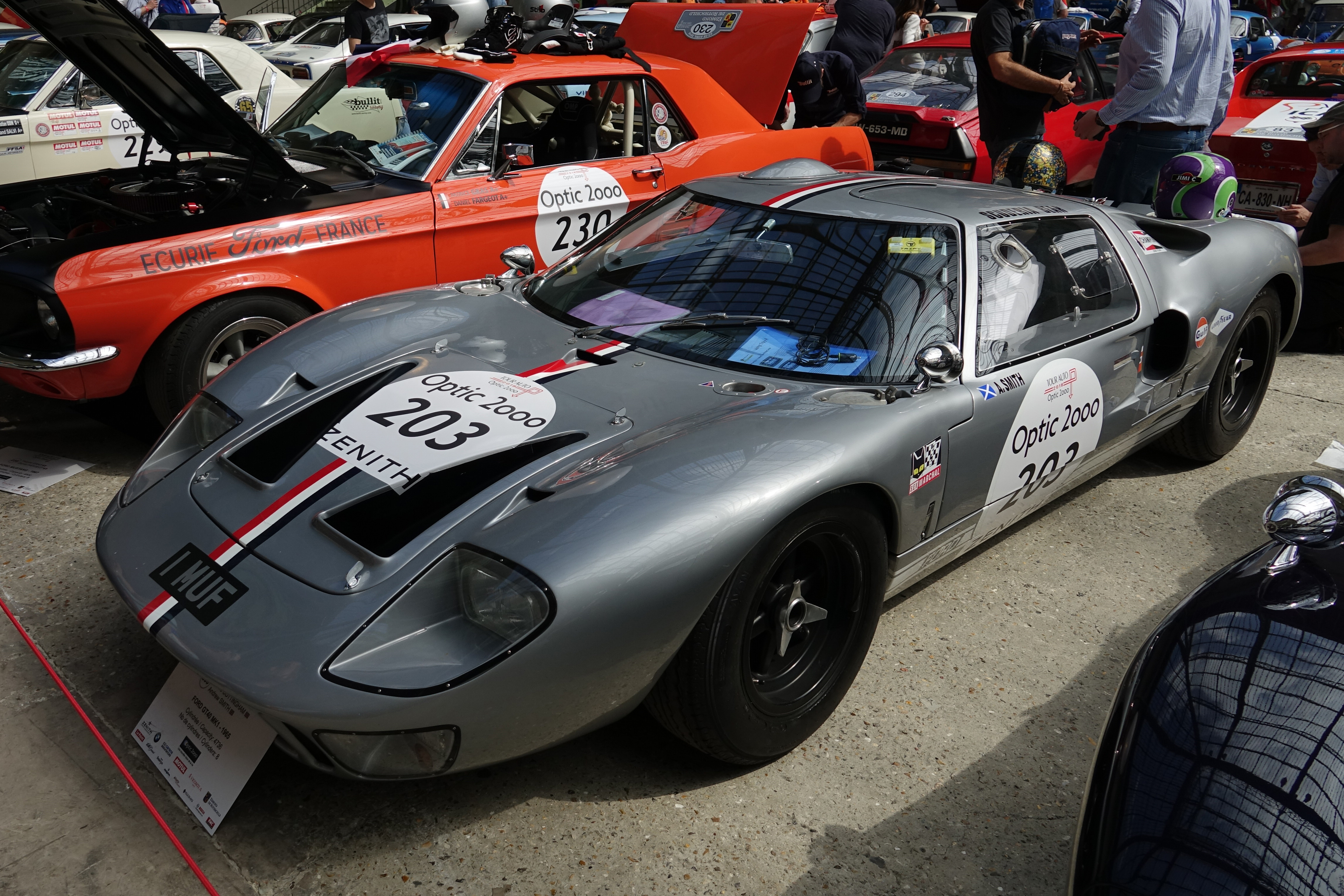 Ford GT40 au Grand Palais